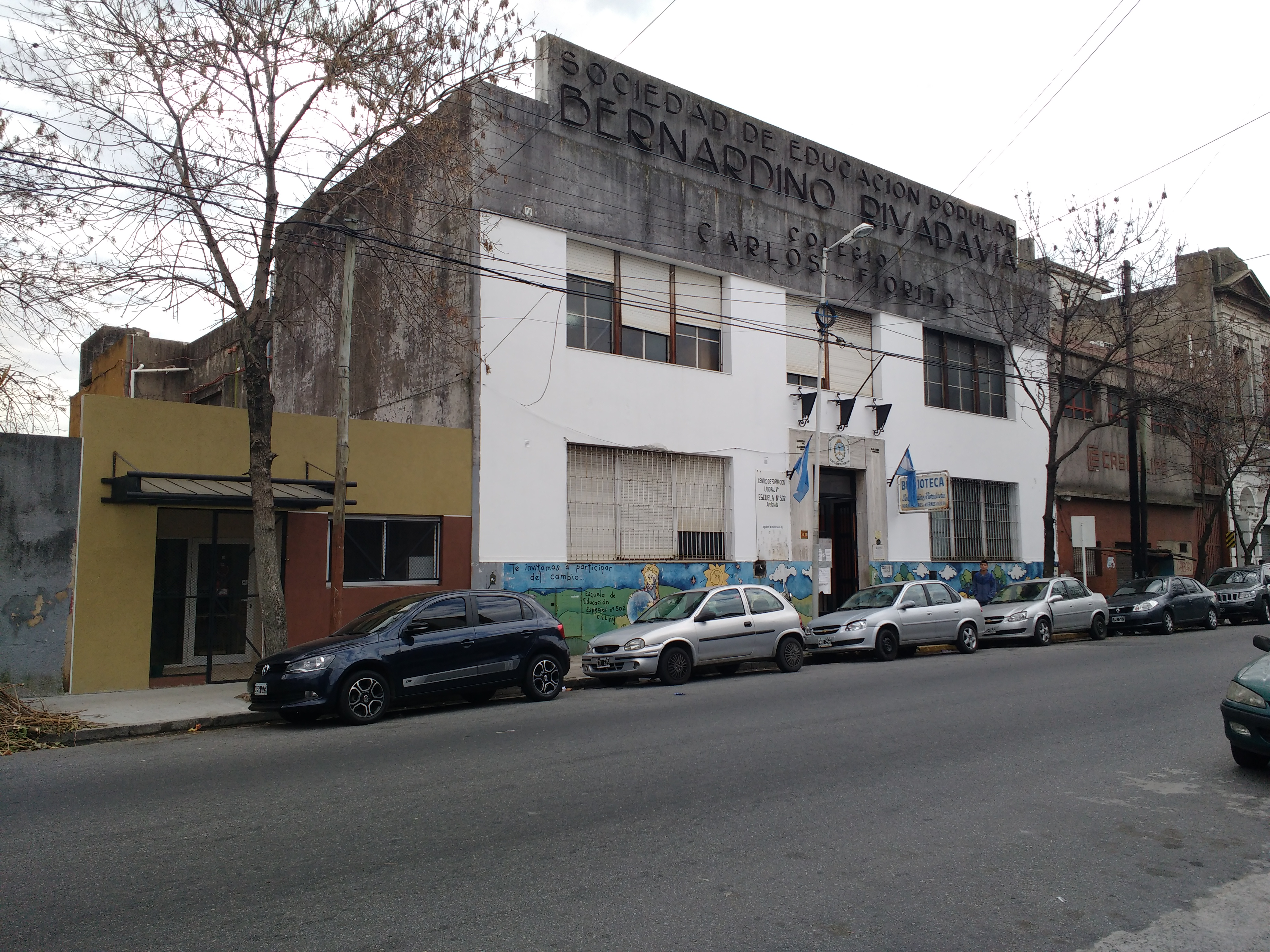 Edificio de la actual Escuela de Educación Especial 502 y del Centro de Formación Integral 1, ubicado en Moisés Lebehnson 965, en el barrio de Piñeyro, Avellaneda. Funcionó la Sociedad de Educación Popular Bernardino Rivadavia, organización vecinal que fundó una biblioteca y una escuela nocturna que, luego de varias iniciativas, cumple el objetivo de tener un edificio propio en 1935. Tanto el edificio y el Centro de Formación Integral llevan el nombre de "Carlos Fiorito", uno de los principales vecinos que acompañaron el proyecto inicial, fallecido en 1933, antes de la construcción del espacio.Edificio de la Escuela de Educación Especial 502 y del Centro de Formación Integral 1